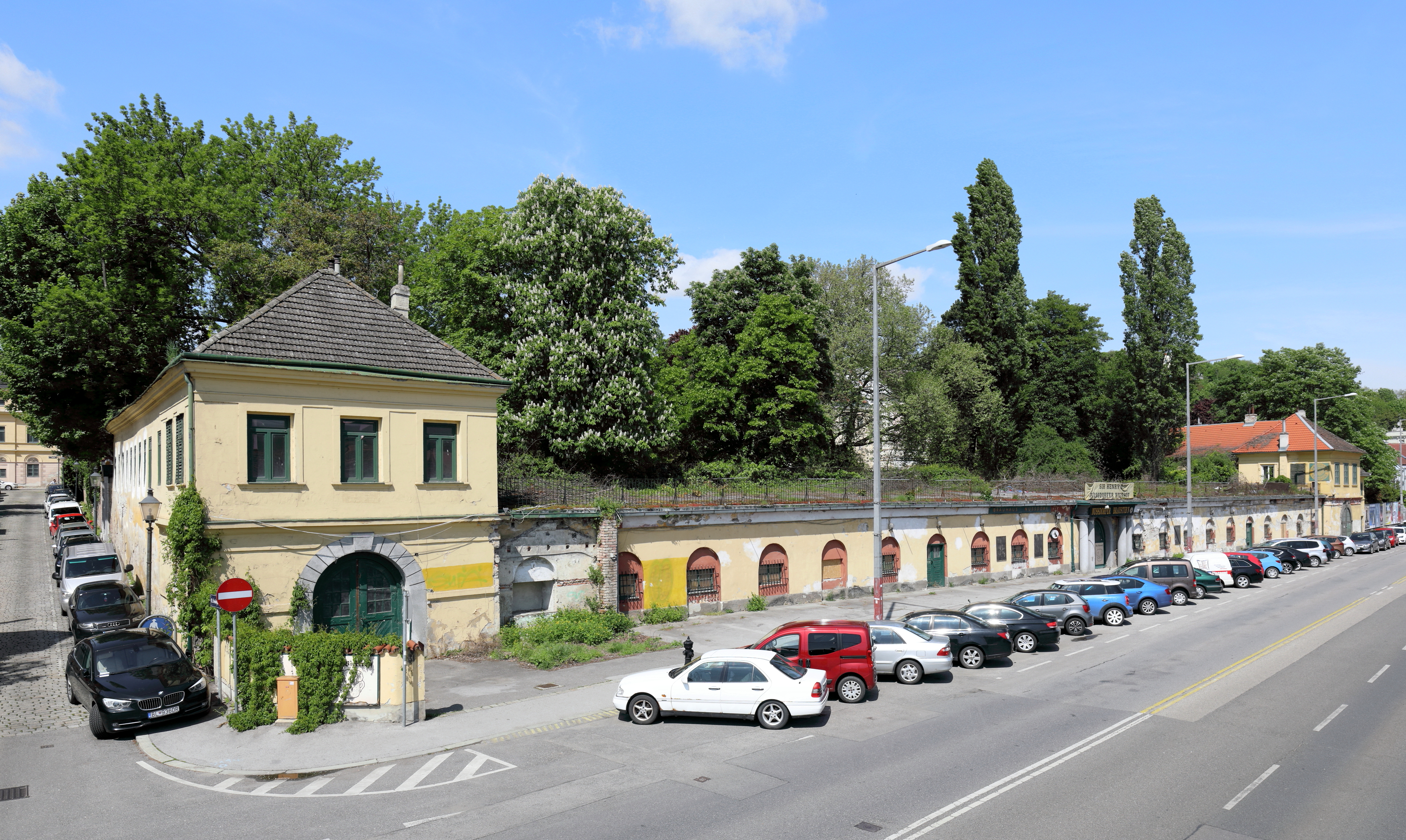 Östliche Nebengebäude an der Heiligenstädter Straße des Altenburger Freihofes in Nussdorf, ein Bezirksteil des 19. Wiener Gemeindebezirkes Döbling. Anfang des 20. Jahrhundert wurde der Altenburger Freihof vom Eigentümer der Nußdorfer Bierbrauerei gekauft und teilweise in die angrenzende Brauerei integriert.